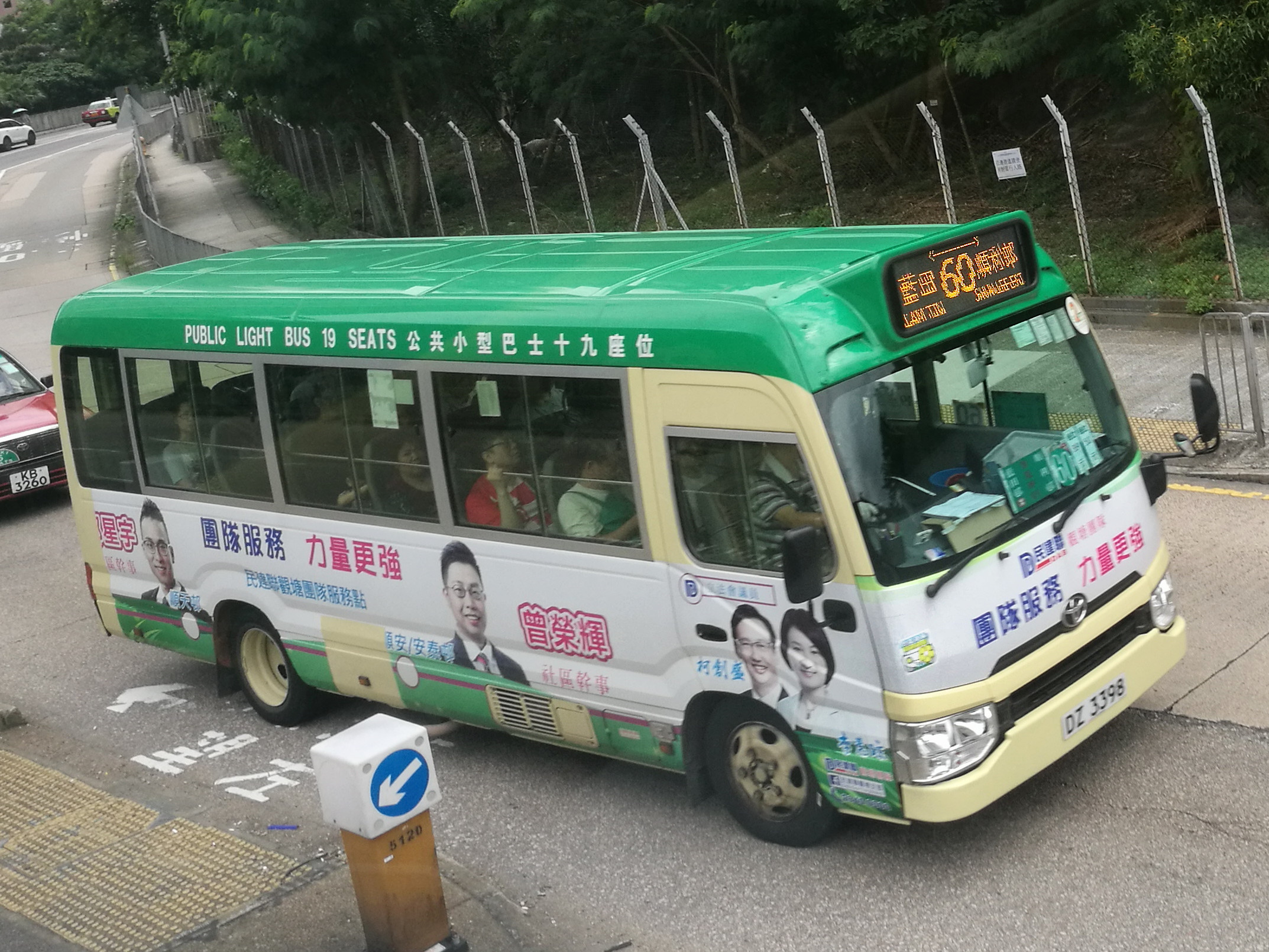 小巴DZ3398的照片